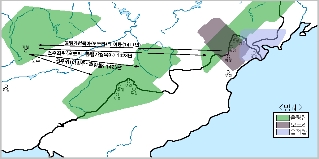 조선 전기 여진 분포와 건주위의 이동